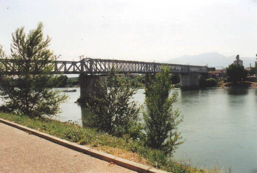 Alte Ebrobrücke in Tortosa, über die bis zum Bau der Hochgeschwindigkeitsstrecke von Barcelona nach Valencia der Zugverkehr rollte (25. Juni 2002).